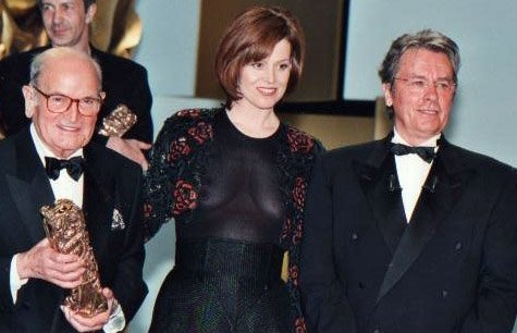 Georges Cravenne, Sigourney Weaver et Alain Delon à la cérémonie des Césars 2000.